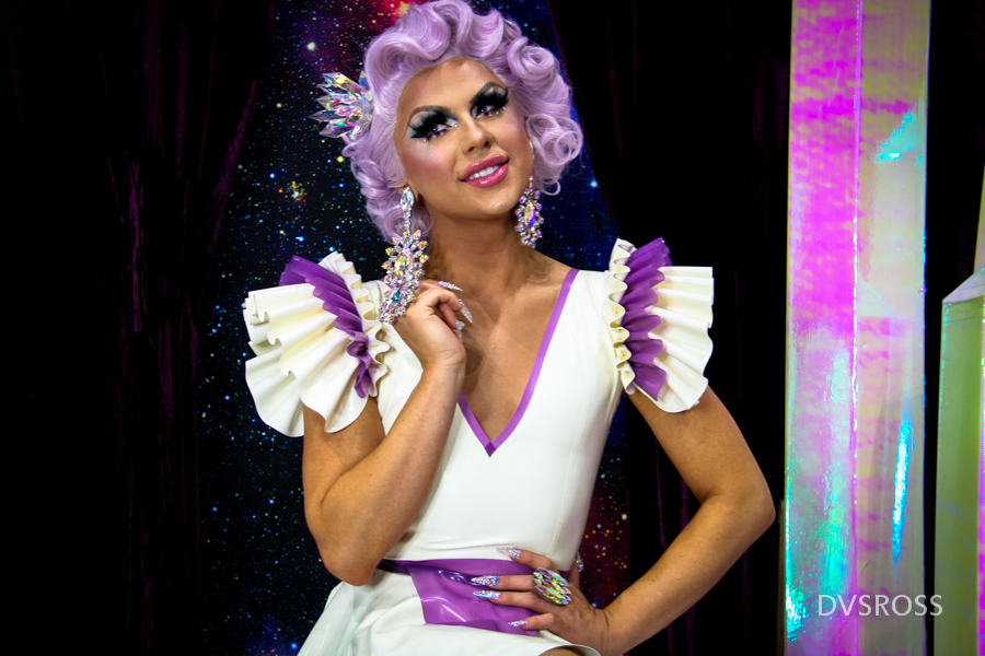 Farrah Moan at RuPaul's DragCon LA 2018